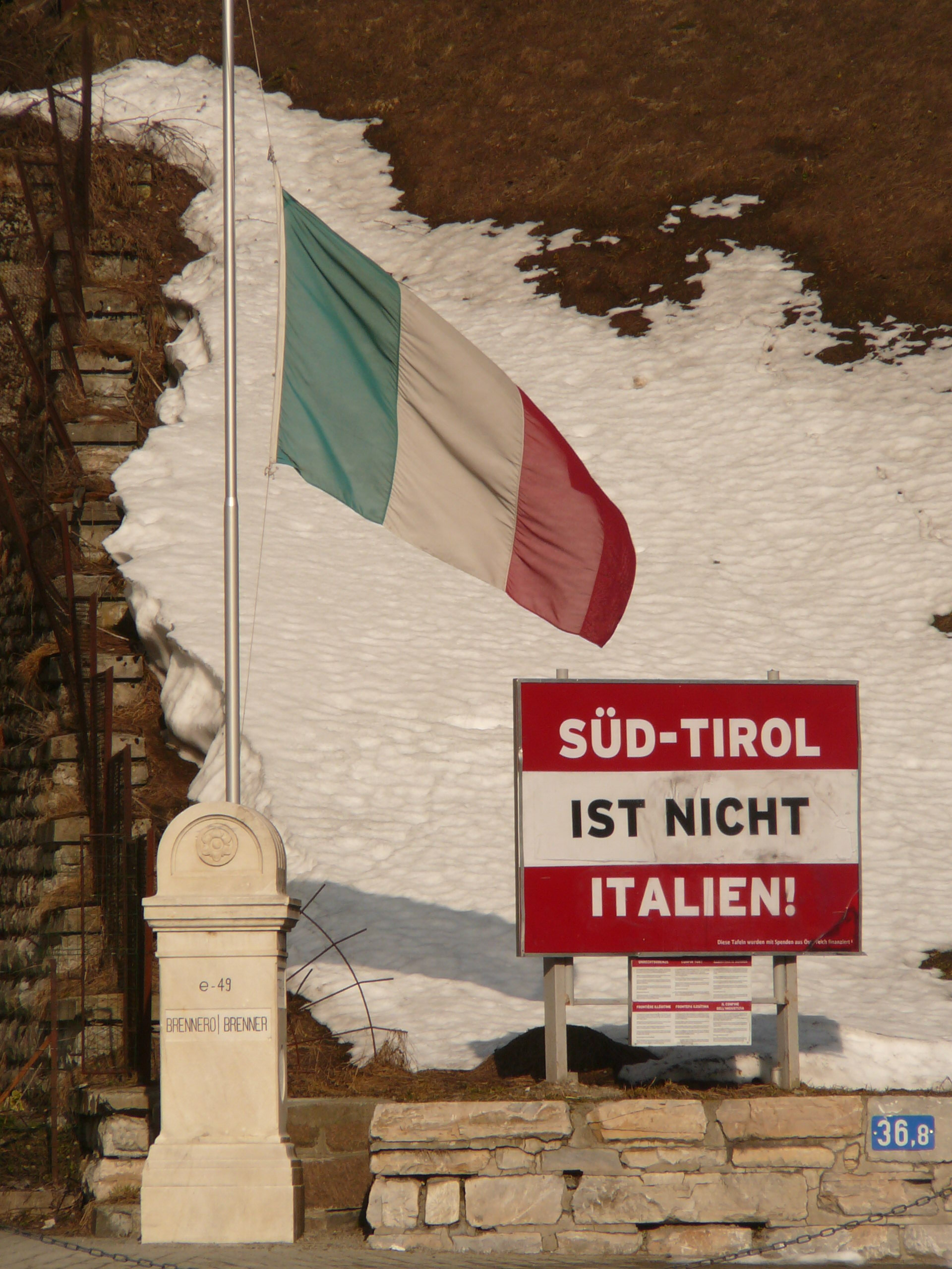 Suedtirol ist nicht Italien, al confine italo austriaco, al passo del Brennero